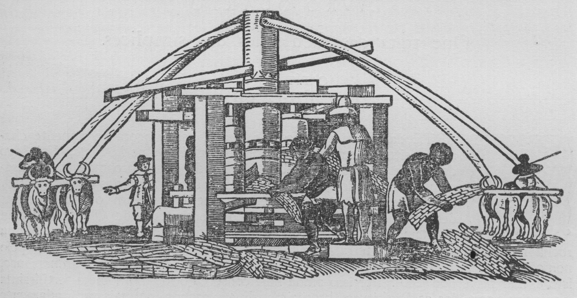 Engenho de açúcar - Image in Historia Naturalis Brasiliae, de Guilherme Piso (Guilielmi Pisonis), dedicate to Johann Moritz Fürst von Nassau-Siegen.